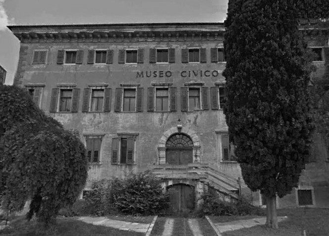 Palazzo Sichard-Jacob (o Scopoli-Jacob) di Via Calcinari, a Rovereto - anni 90